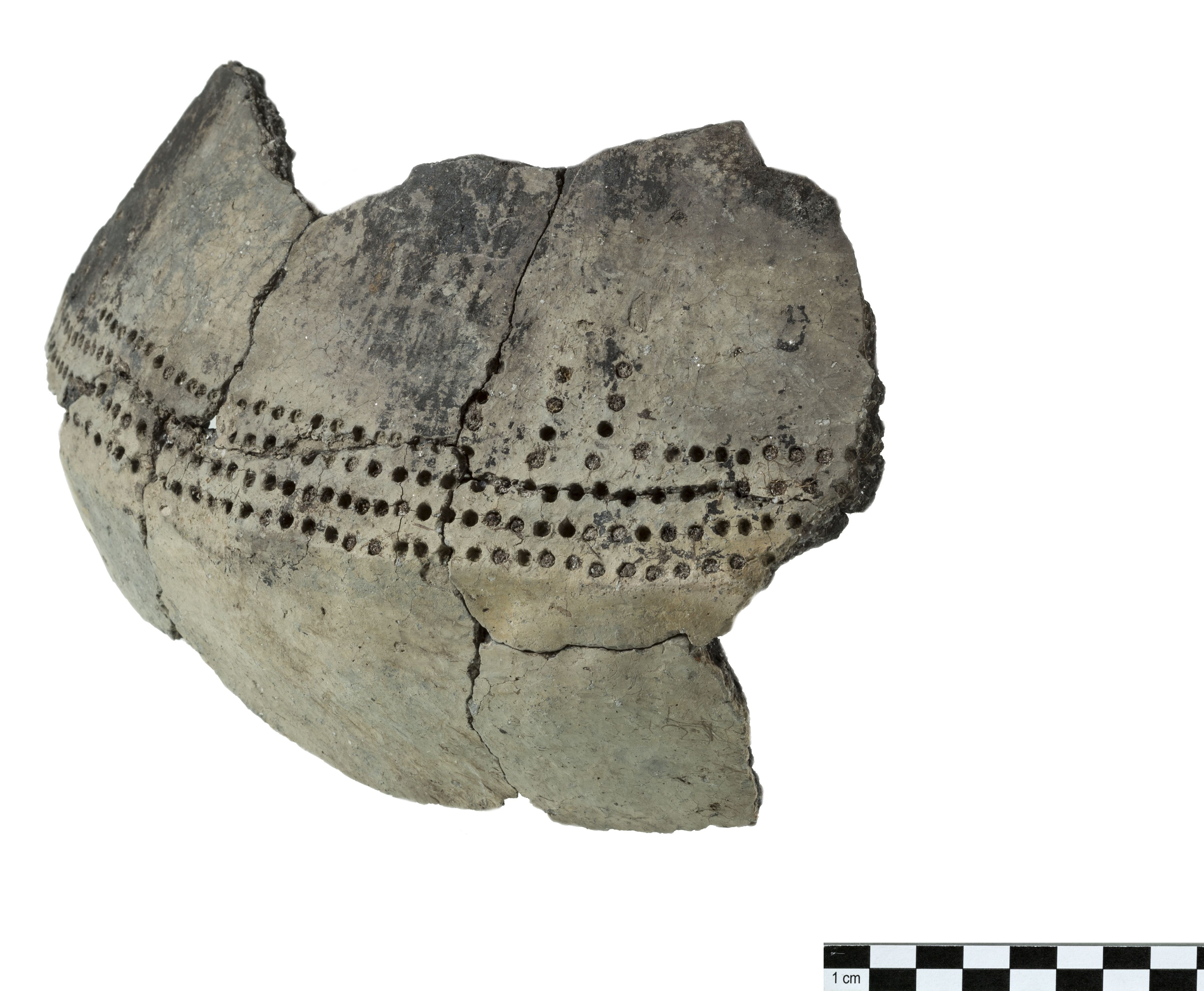 Bildarchiv der Kantonsarchäologie Aargau Archiv Nr. Col./Dig.: 092438 Objekt: Wandscherbe eines grossen Topfs, Keramik, Bruebach-Oberbergen-Kultur Fundort: Beinwil am See, Ägelmoos Fundjahr: 2000 Beschreibung: Mit einem Altern von über 6000 Jahren zählt das Gefässfragment zu den frühesten Zeugnissen bäulerlicher Gemeinschaften im Schweizer Mittelland. Form und Verzierung sind typisch für den Stil Bruebach-Oberbergen, wie er um 4200 v. Chr. am Oberrhein verbreitet war. Sie zeigt somit eine mögliche Verbindung nach Norden in dieser Zeit, vergleichbar mit vereinzelten Funden in verschiedenen anderen Seeufersiedlungen im Wauwilermoos (Egolzwil) und in Zürich. Datierung: Jungsteinzeit, ca. 4200 v. Chr. Ausstellungsort: Museum Burghalde Lenzburg Ausgrabung: Die flächige Unterwasser-Untersuchung hatte zum Ziel, vertiefte Informationen über Art und Erhaltungszustand sowie über die Erosionsgefährdung der Fundstelle zu erhalten. Die Uferplatte wurde grossflächig inspiziert bis und mit der Abbruchkante und der Haldenoberkante. Auf Eingriffe in den Untergrund wurde grösstenteils verzichtet, dafür die Oberfläche relativ grossflächig abgewedelt und erfasst: viele liegende Hölzer, die an der Oberkante z.T aus der Halde herausragten; Bergung der Keramikfragmente; Entnahme von Dendroproben.